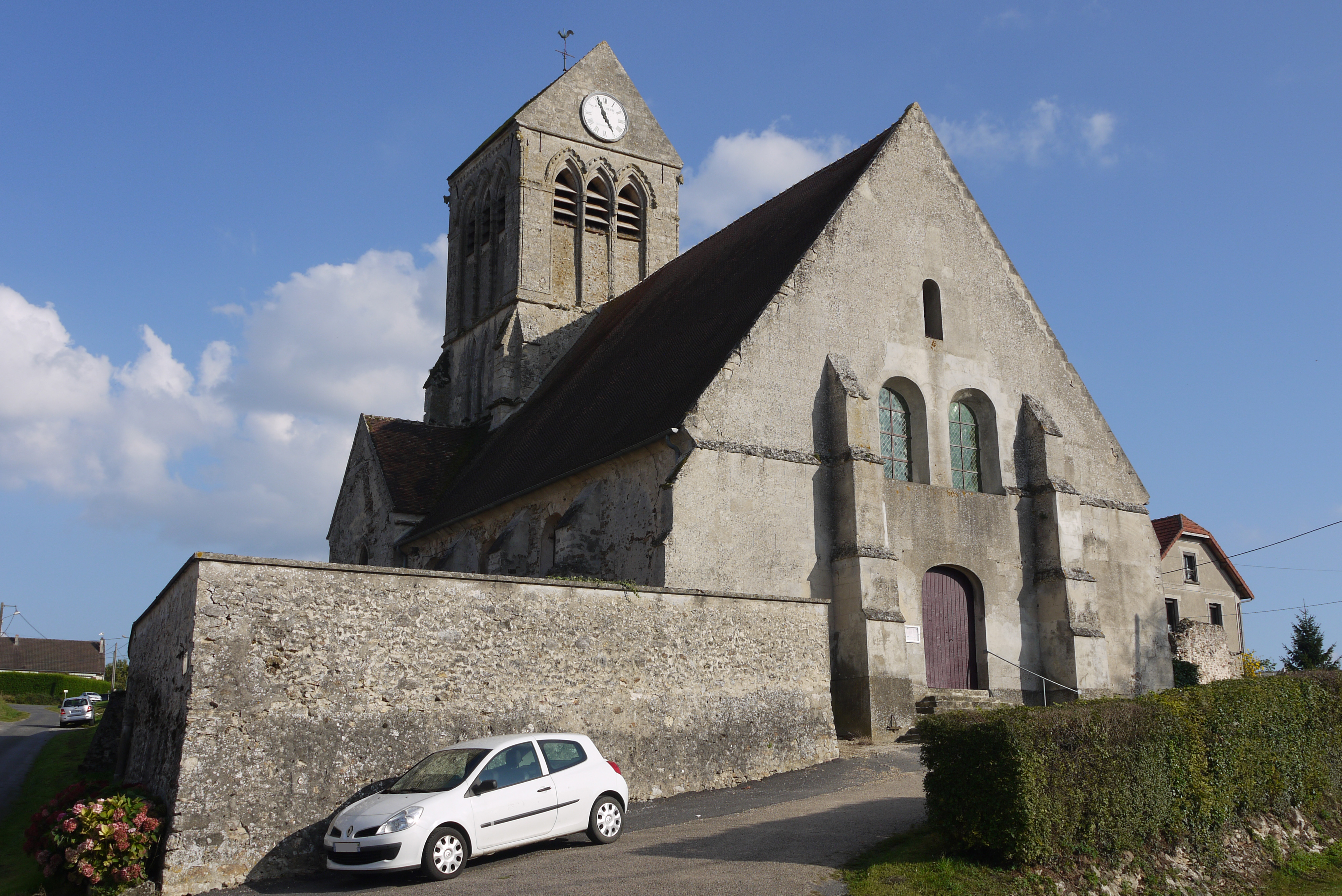 Église d'Épieds.